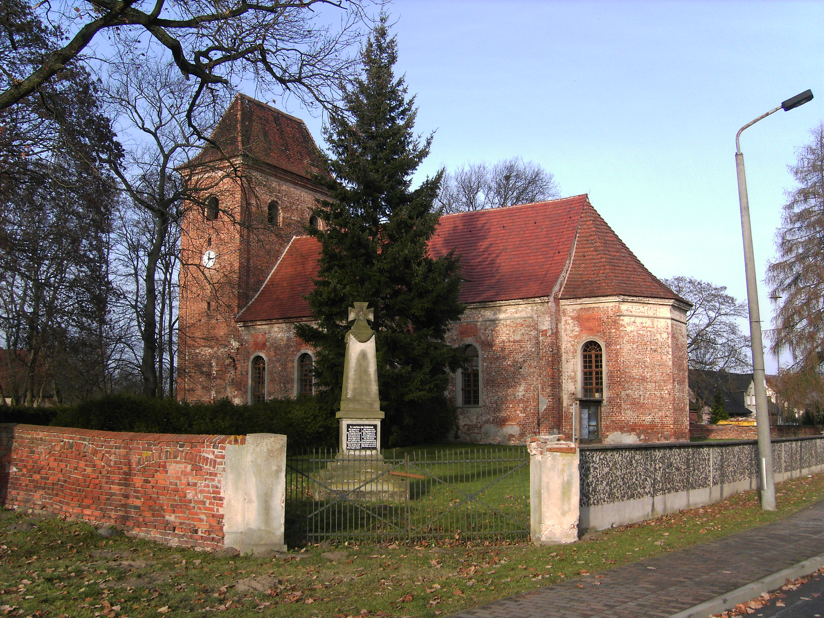 Dorfkirche in Vieritz, Ansicht von Südosten